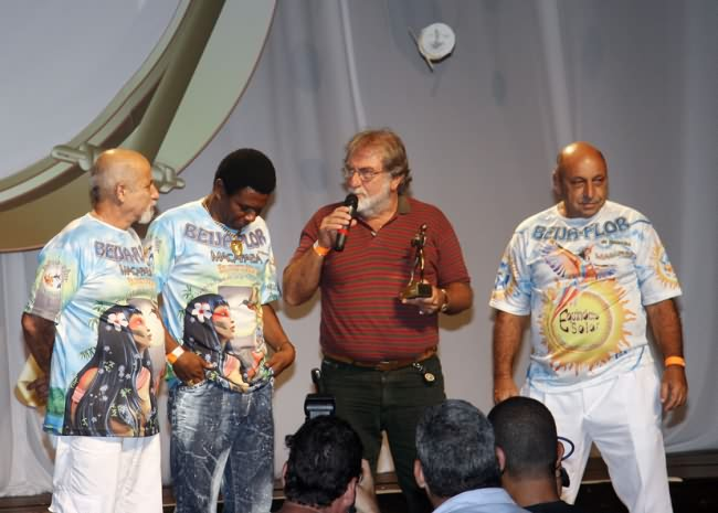 Fotógrafo Henrique Matos